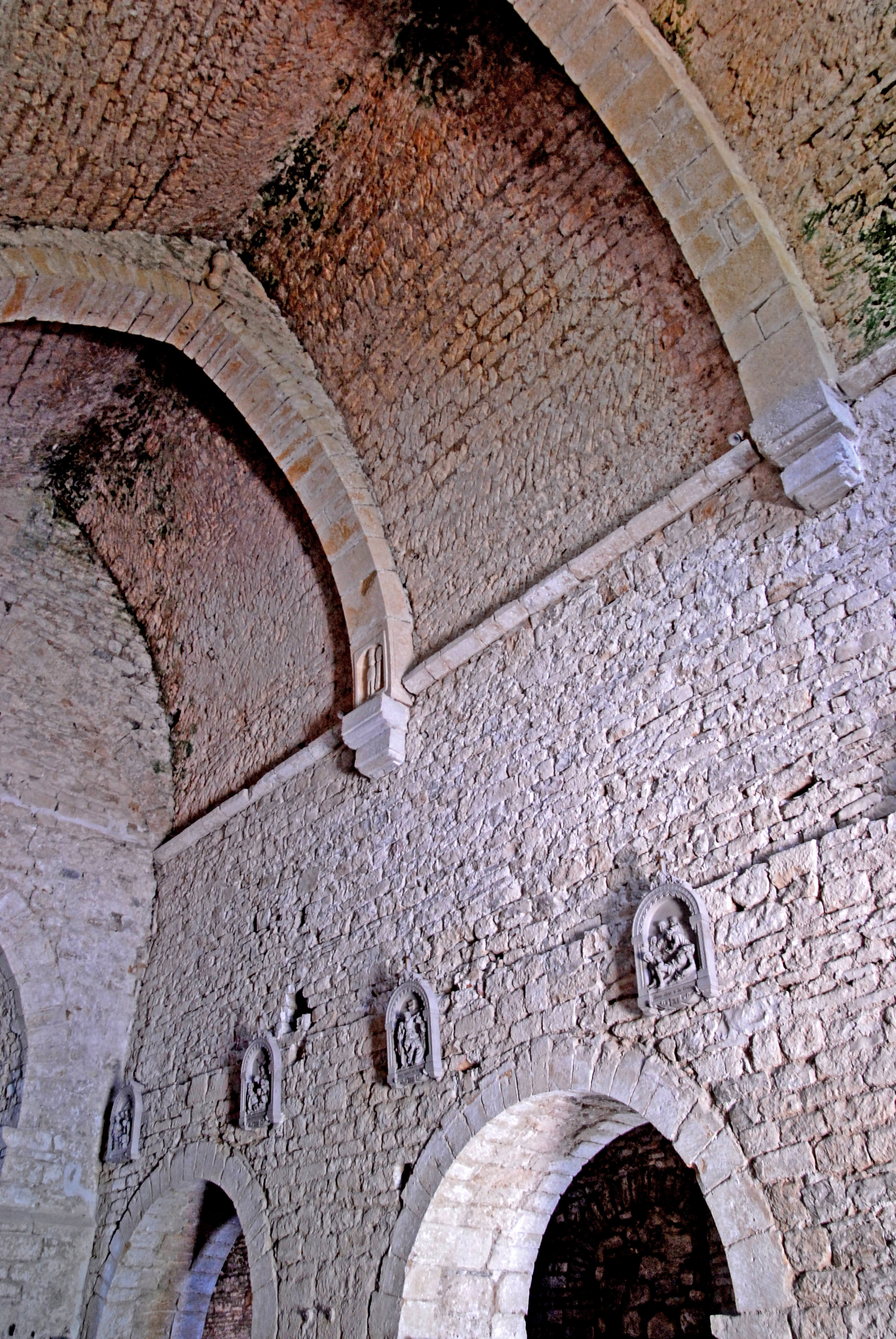 Saint-Hymetière, Gewölbe des Mittelschiffs